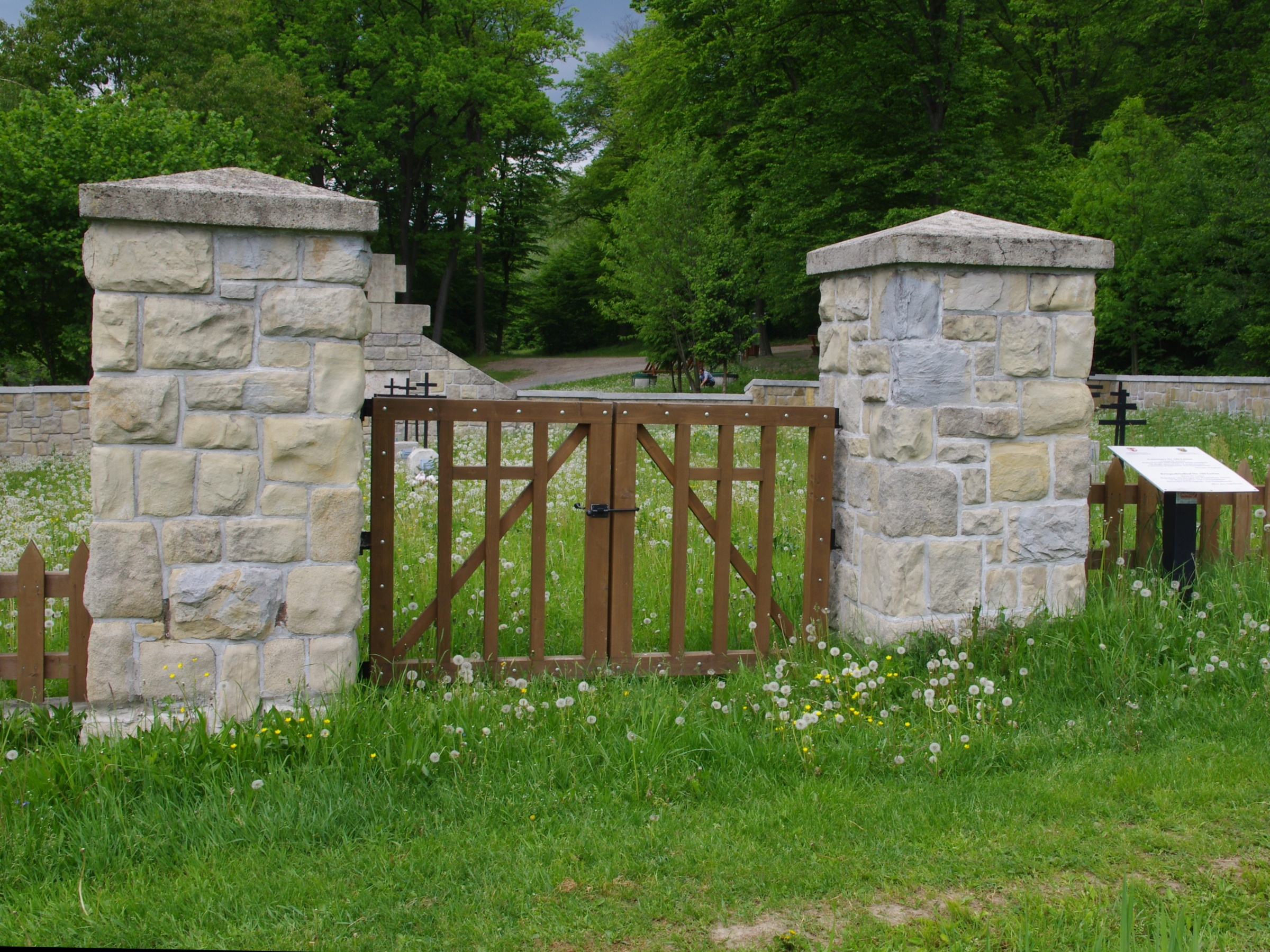 Cmentarz wojenny nr 122 - Łużna